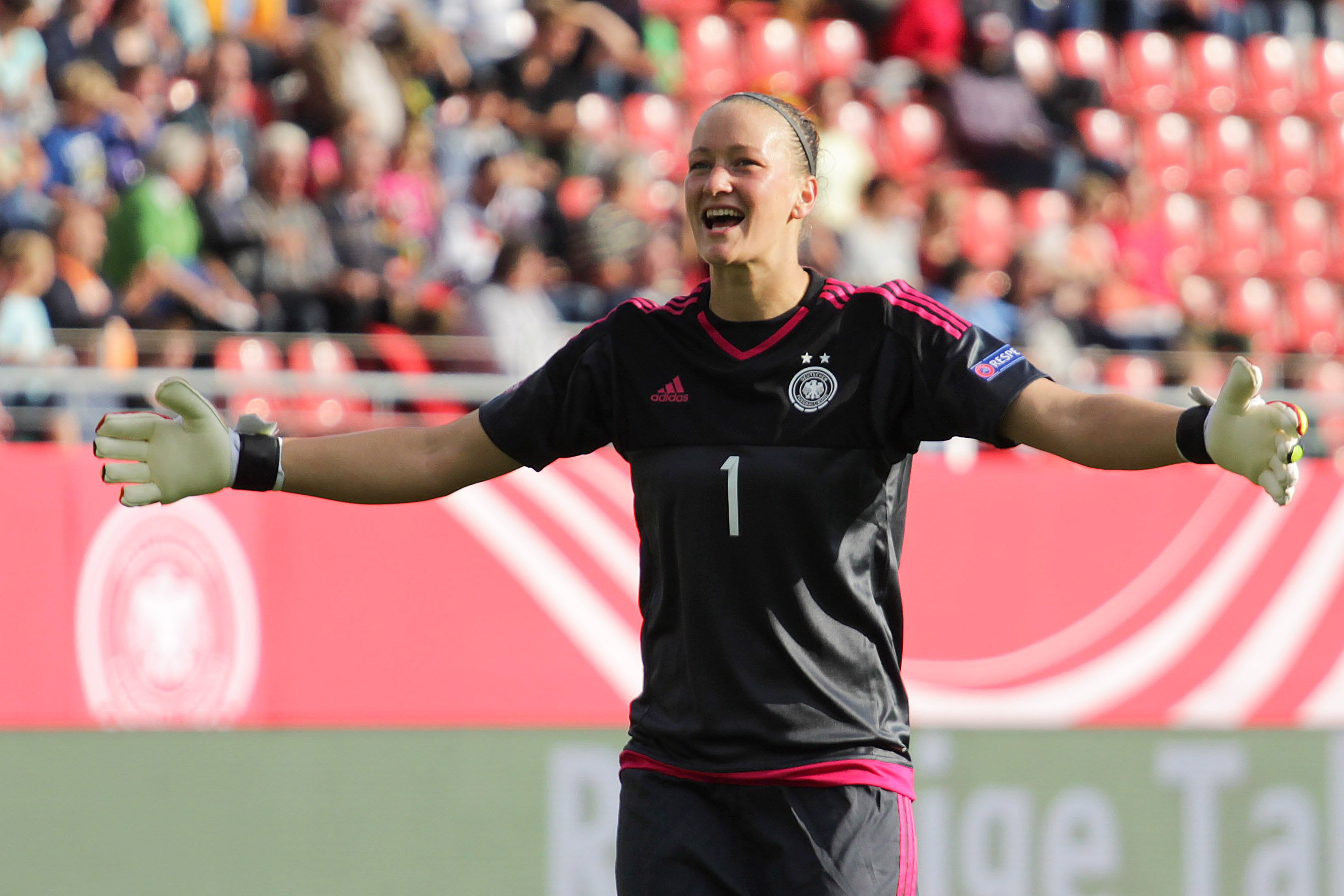 Almuth Schult im Trikot der Deutschen Nationalmannschaft